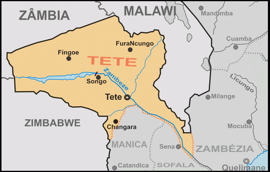 Mapa da Província de Tete, em Moçambique - feita para a Wikipédia por André Koehne